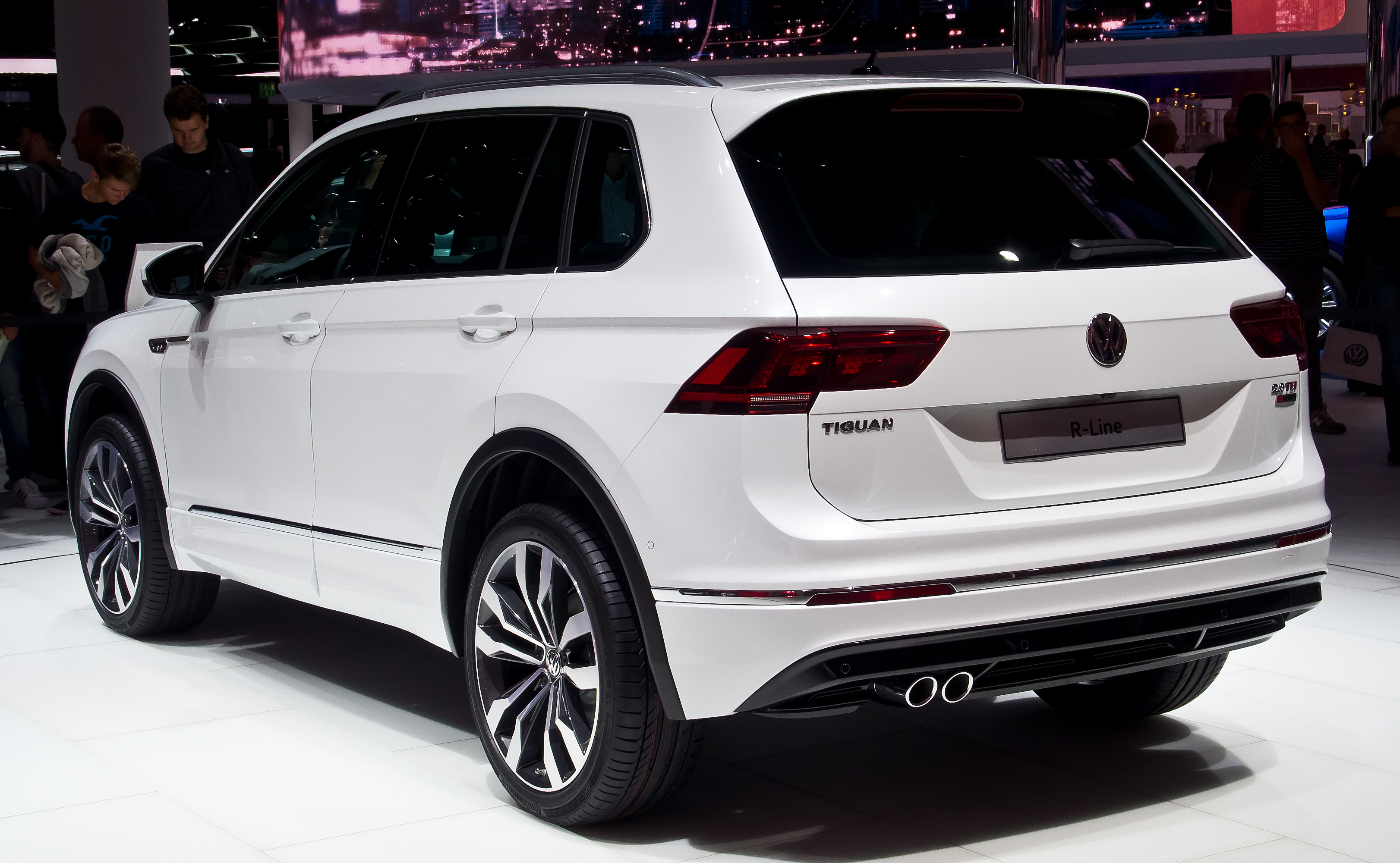 VW Tiguan 2.0 TDI 4MOTION R-Line (II)